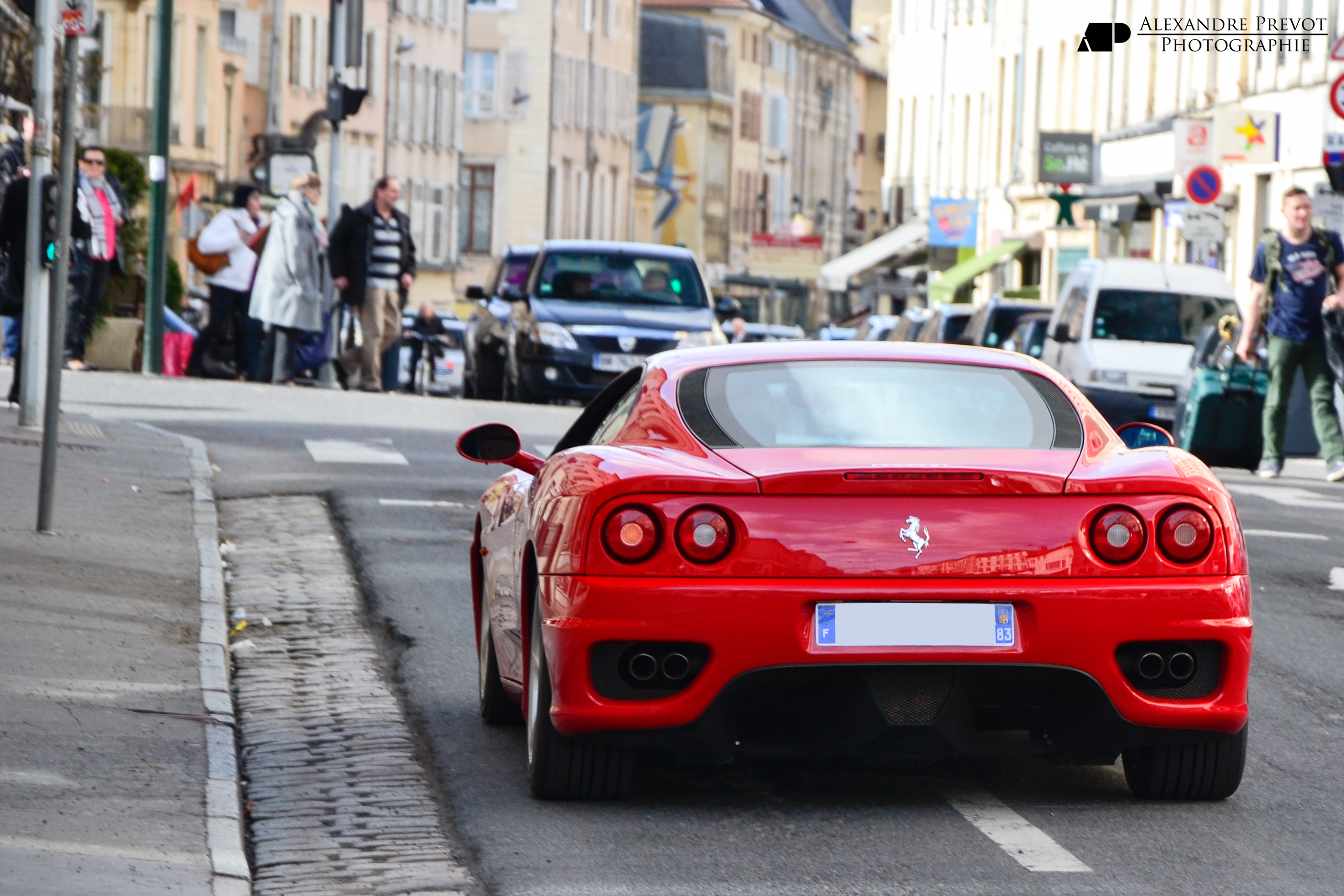 Una Ferrari 360 Modena rossa fiammante